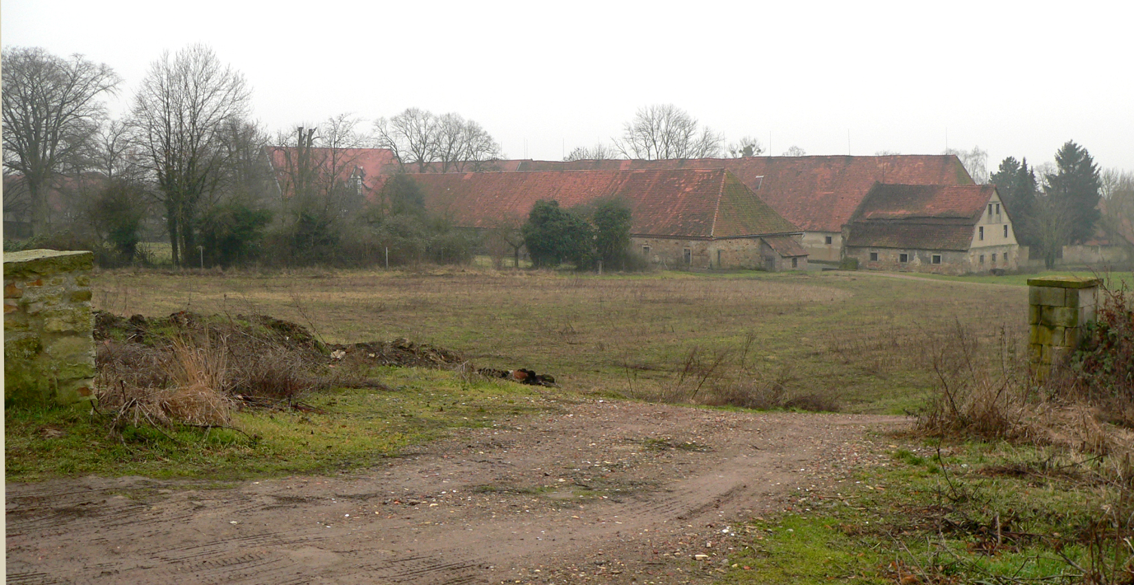 Rittergut Stemmen, Wirtschaftsgebäude